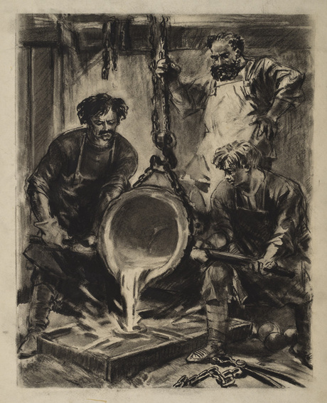 Իսաբեկյան Էդուարդ Հմայակի (1914 - 2007) (Ս. Խանզադյանի «Մխիթար Սպարապետ» պատմավեպի նկարազարդում) (1953)